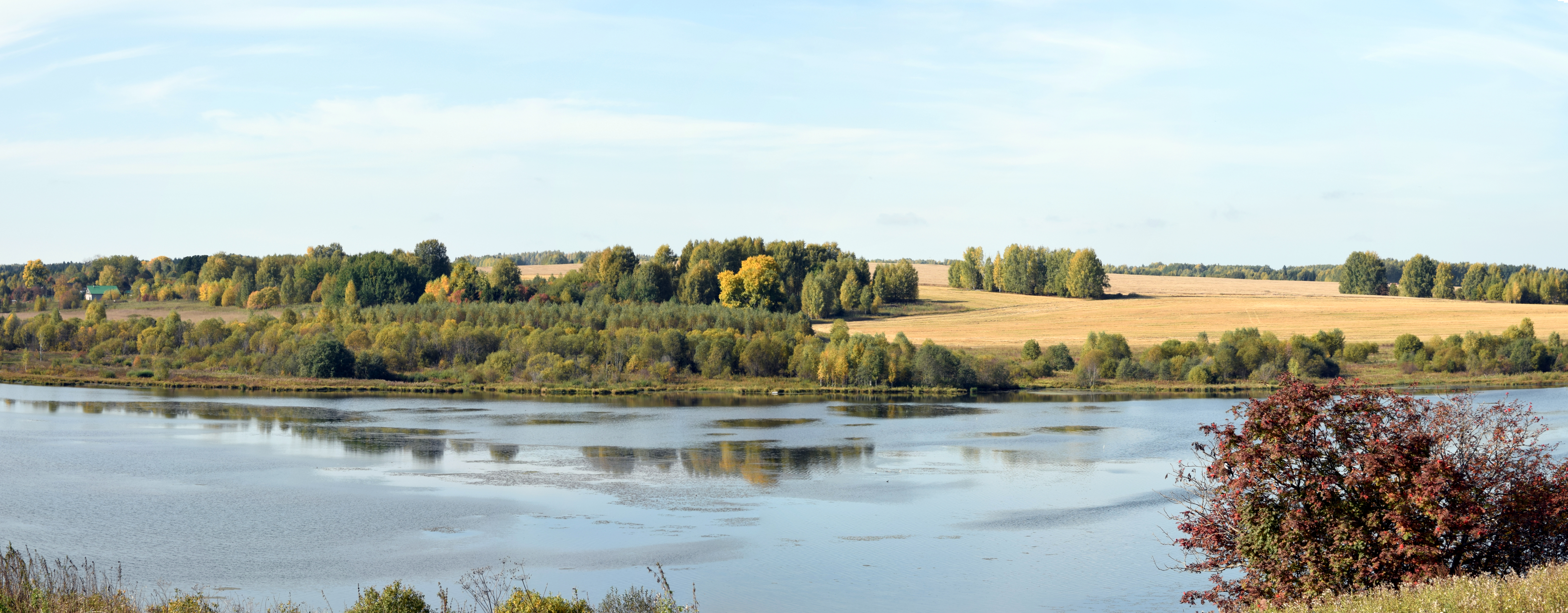 Река Куменка у деревни Кореповщина Куменского района Кировской области This image has been uploaded for Wikivoyage travel guide on Кировская область